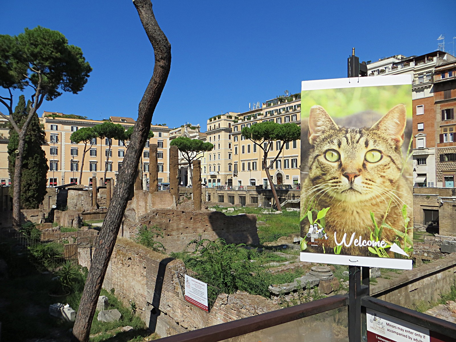 Largo di Torre Argentina